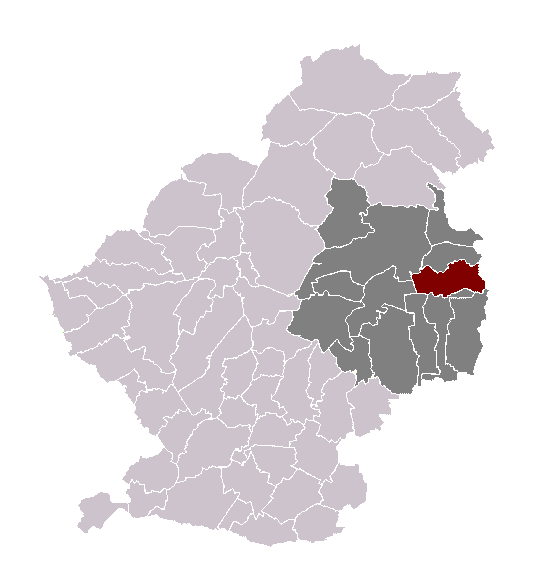 Wandignies-Hamage dans son canton et son arrondissement